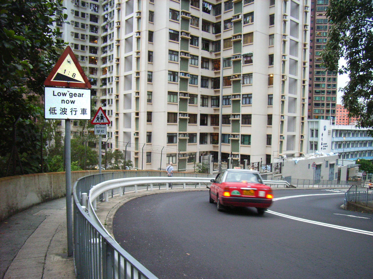 香港北角炮台山，炮台山道